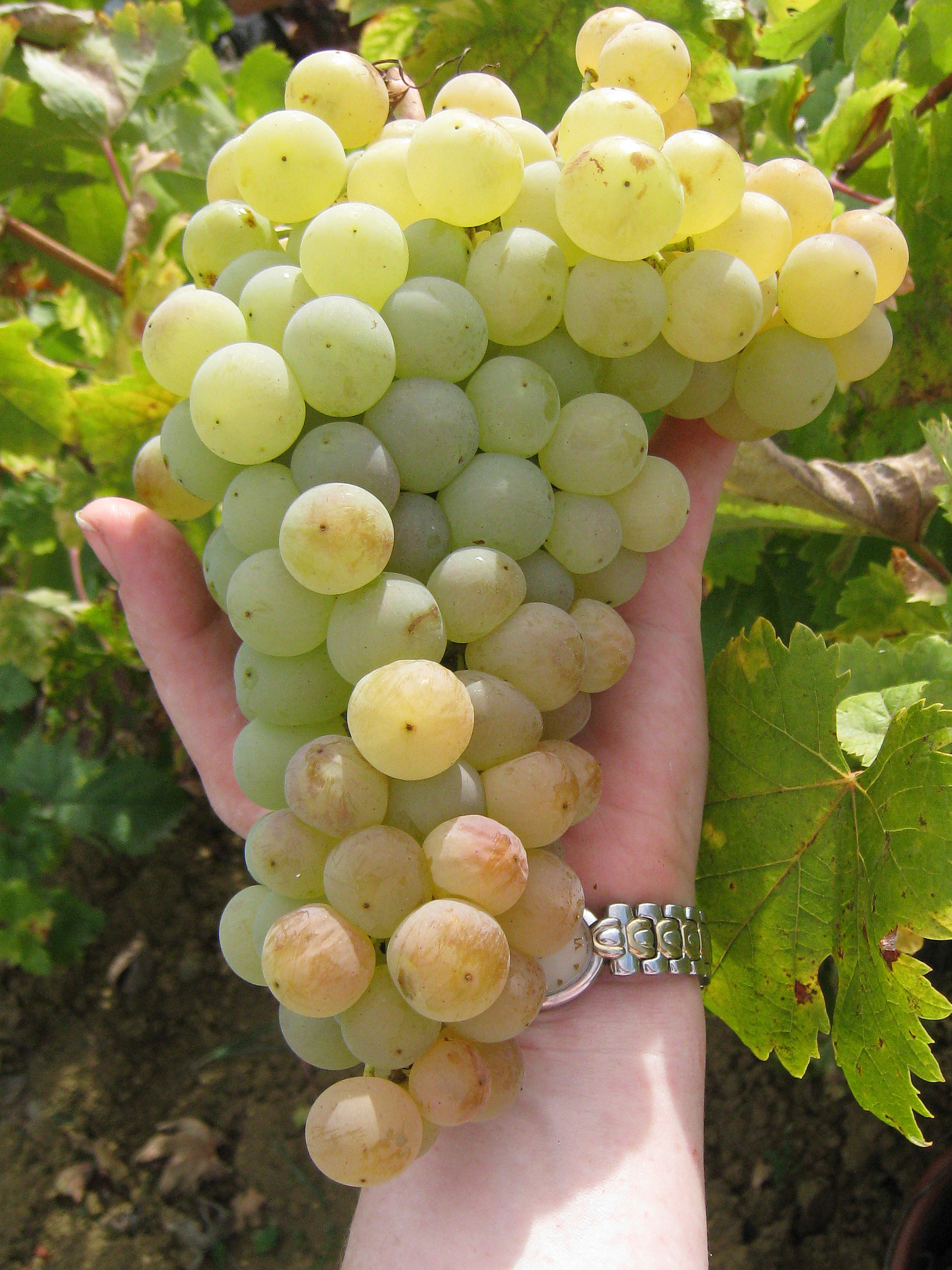 Grappe de mauzac blanc dans le domaine de Plageoles à Gaillac